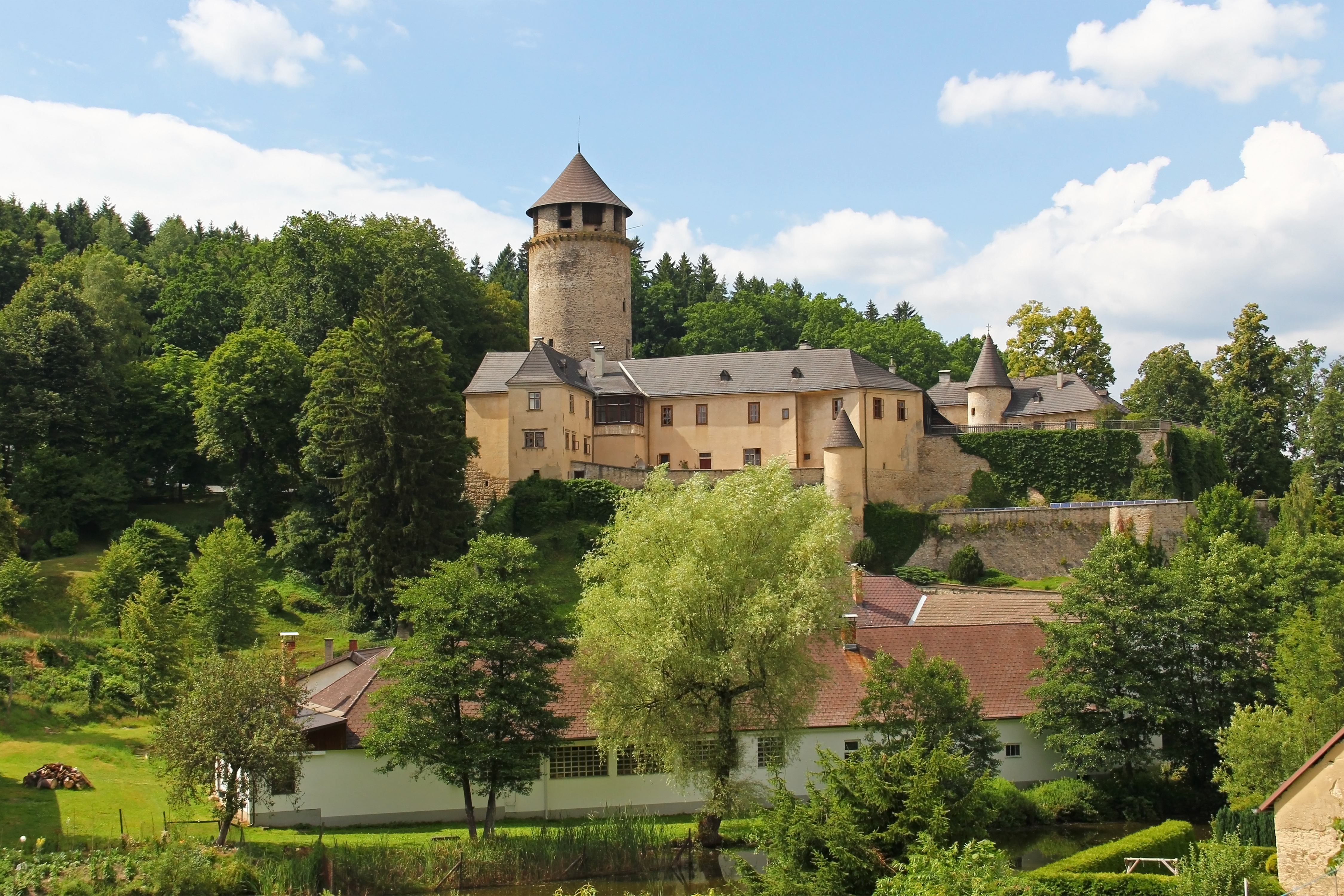 Die gotische Spornburg wurde bis ins 18. Jahrhundert mehrfach umgebaut. Nachdem sie im 19. Jahrhundert zerfiel, wurde sie von 1888 bis ungefähr 1910 wieder aufgebaut.